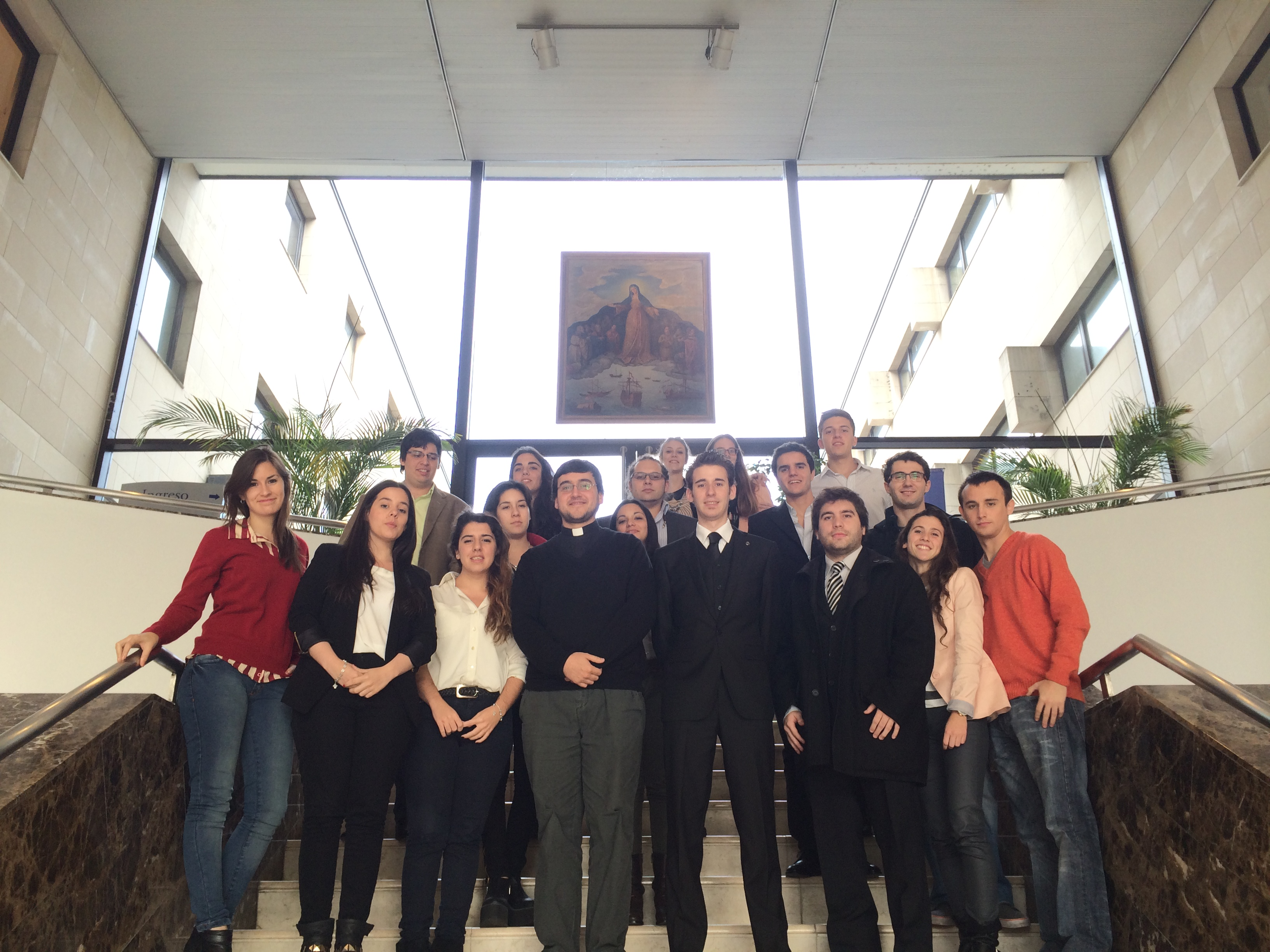 Autoridades de la Federación de Estudiantes de la UCA y Centros de Estudiantes de las Sedes del Interior del país.